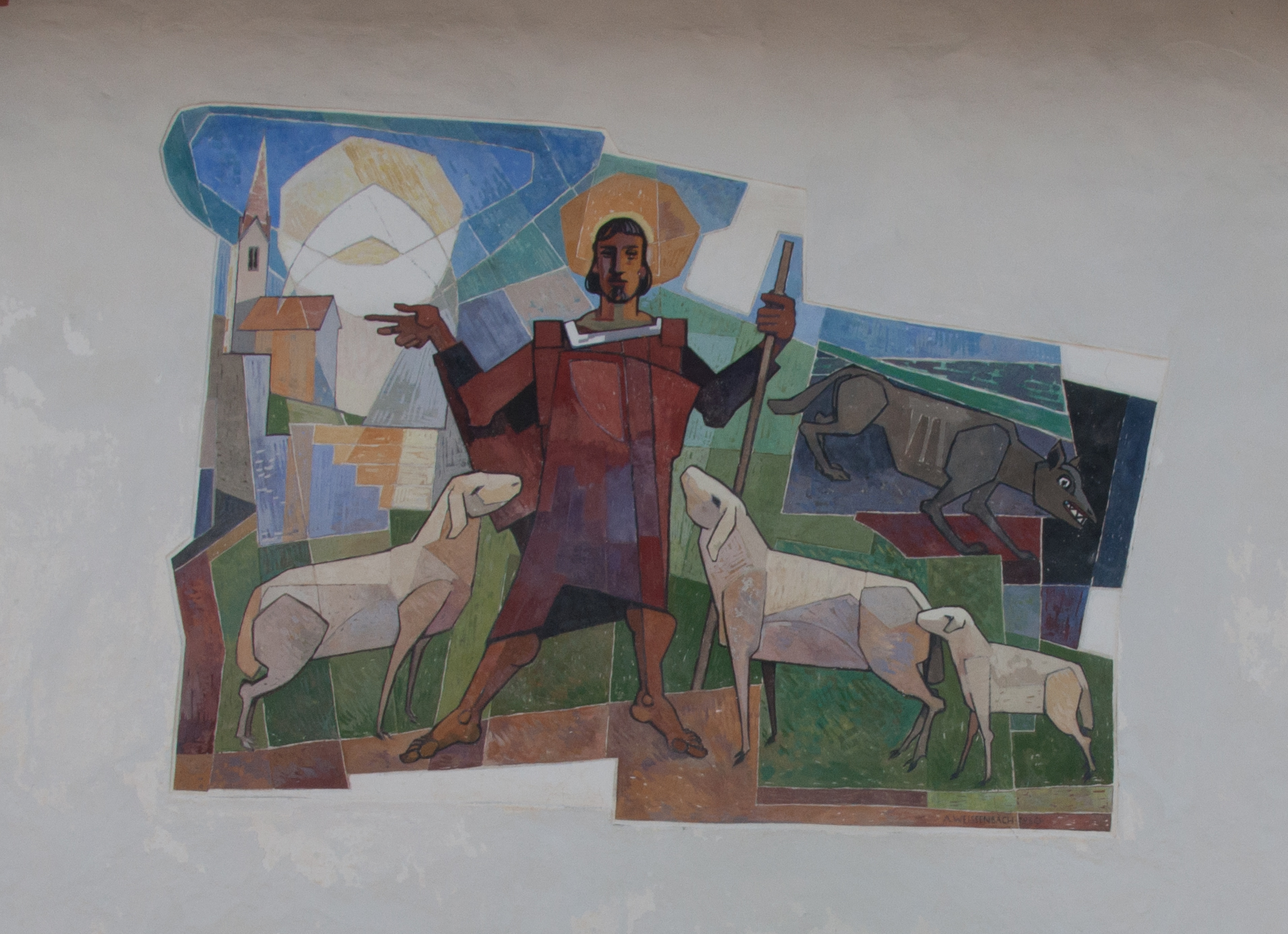 Widum